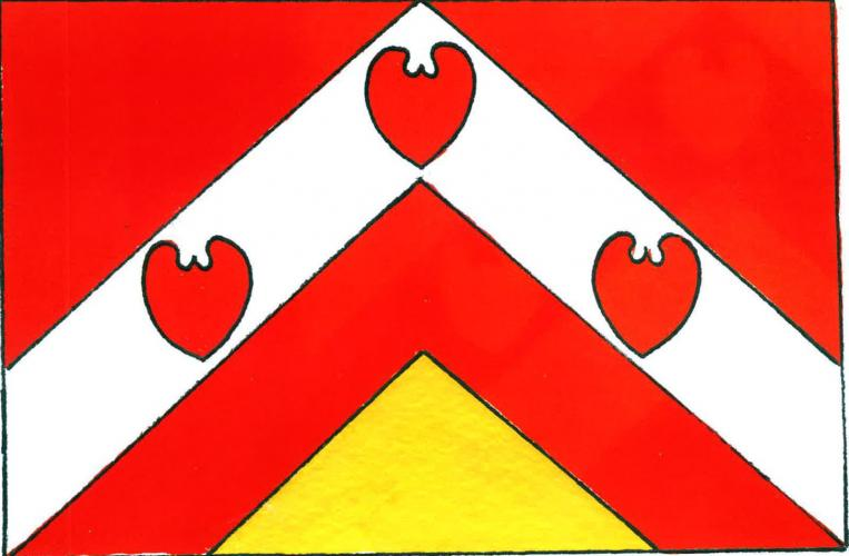 Slavíkovice TR vlajka